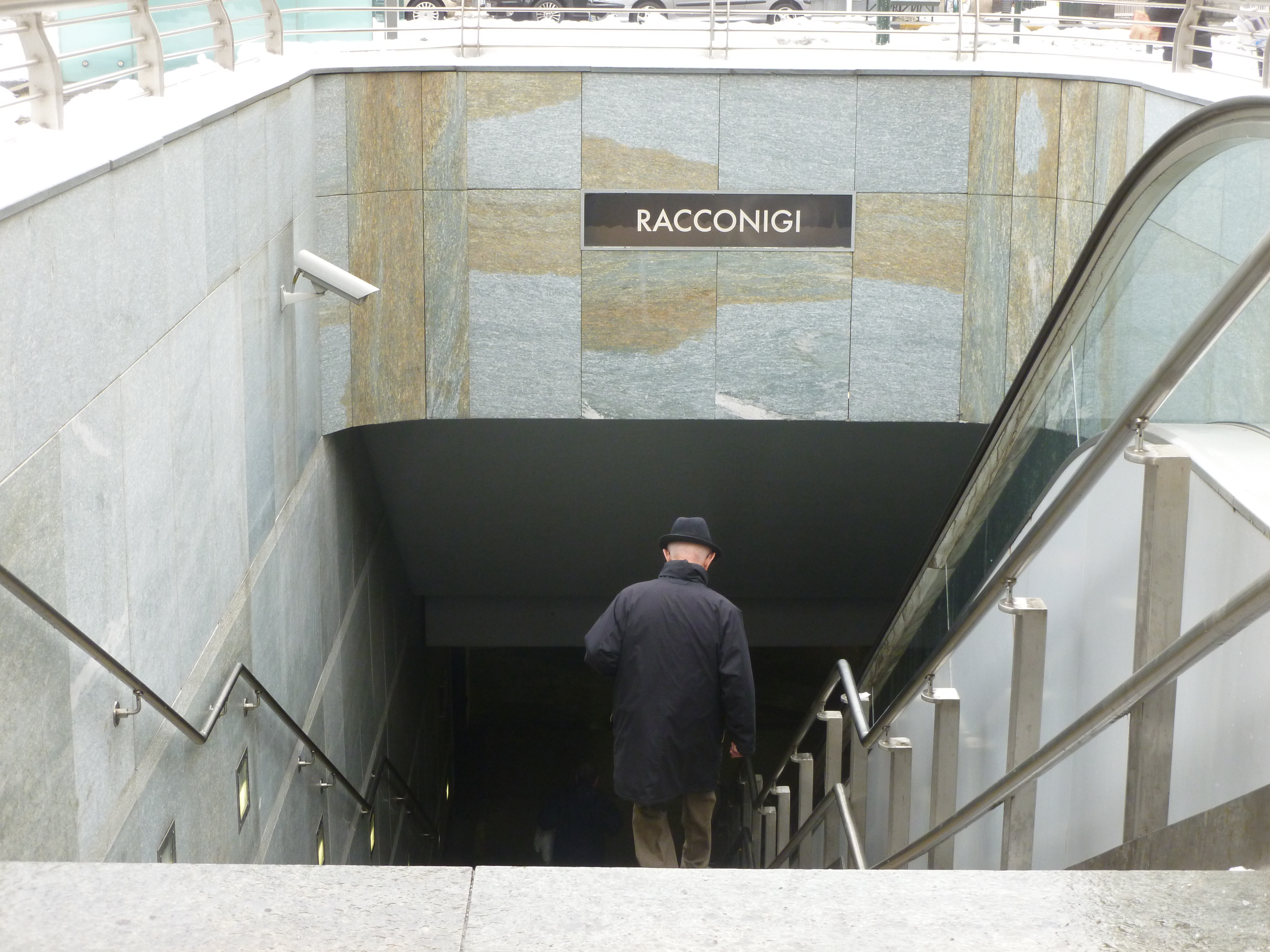 Piemontèis: Stassion Raconìs dla metropolitan-a 'd Turin